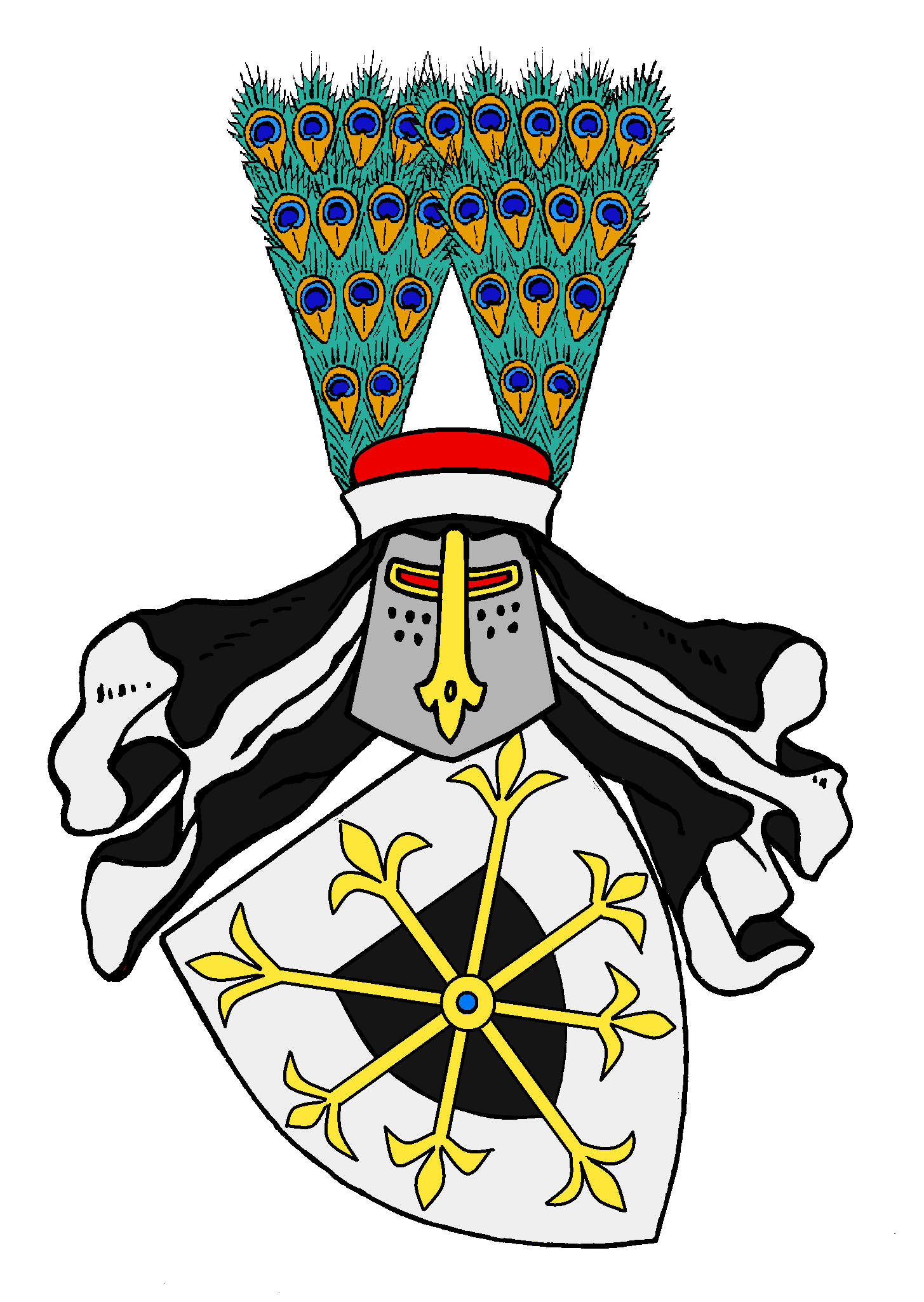 Stammwappen derer von Schönburg auf Wesel: „In Silber ein schwarzer Herzschild. Darüber ein goldenes Glevenrad, belegt mit einem blauen Edelstein auf der Nabe. Helmzier ein roter Turnierhut mit weißem Stulp, darin steckend zwei Stöße Pfauenfeder. Später ein Hund zwischen zwei Büffelhörnern. Helmdecke schwarz-silbern.“ (Humbert von Schönburg auf Wesel 1265) [1]